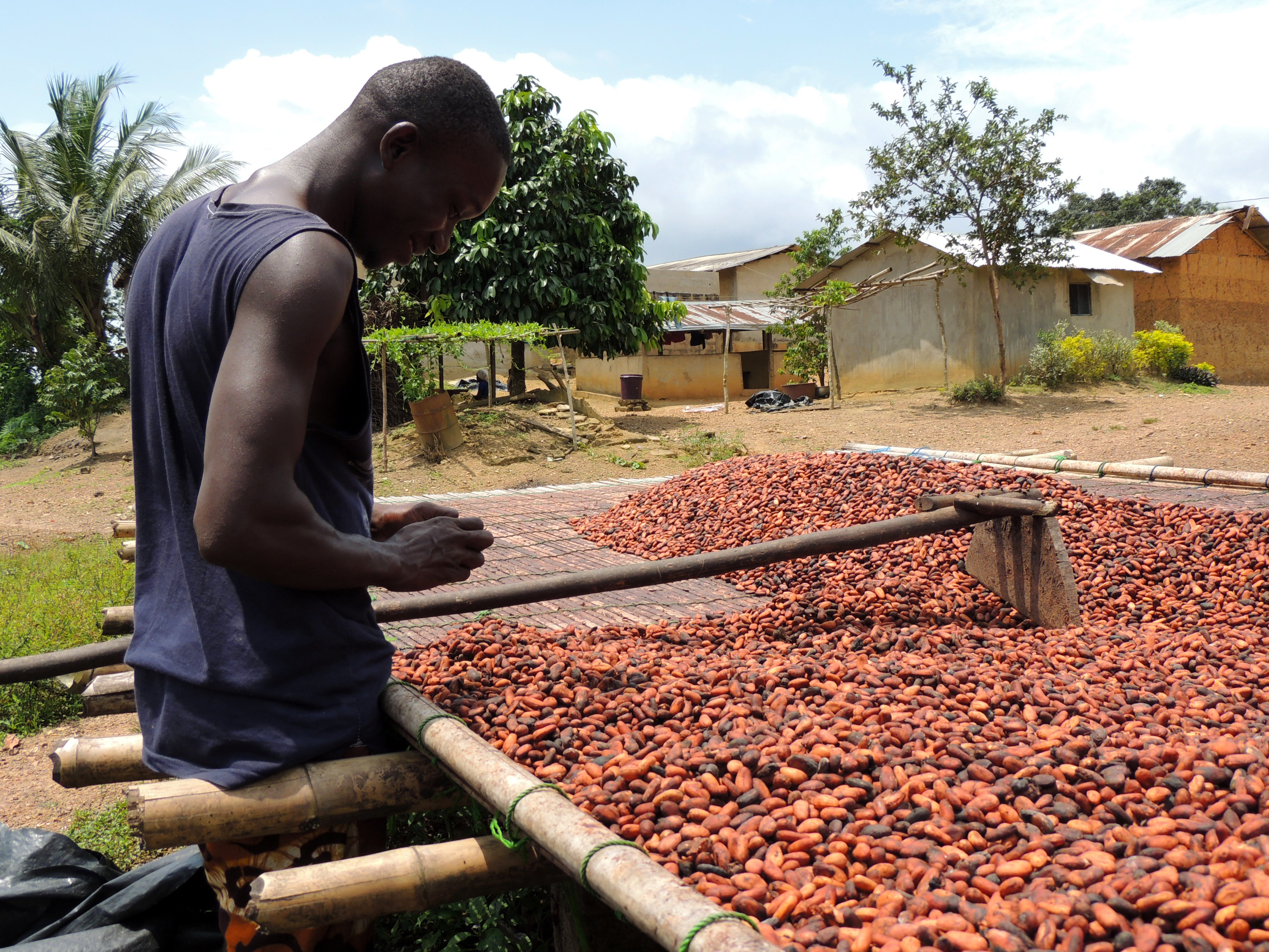 Cultivateur ivoirien de cacao en train de nettoyer et trier les fèves de cacao à faire sécher. This is an image of "African people at work" from Ivory Coast